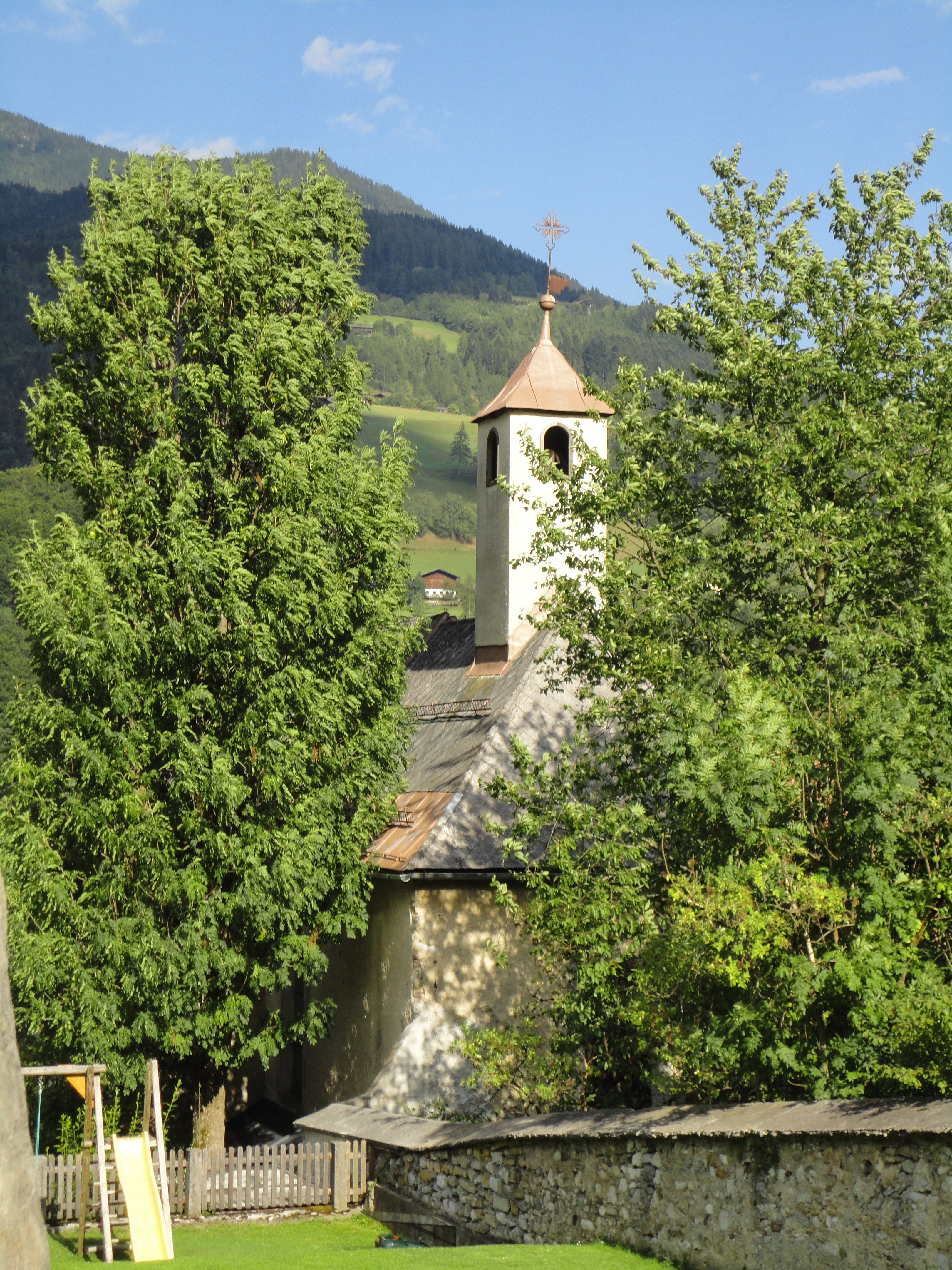 Kapuzinerkloster und Kapuzinerkirche Mariahilf